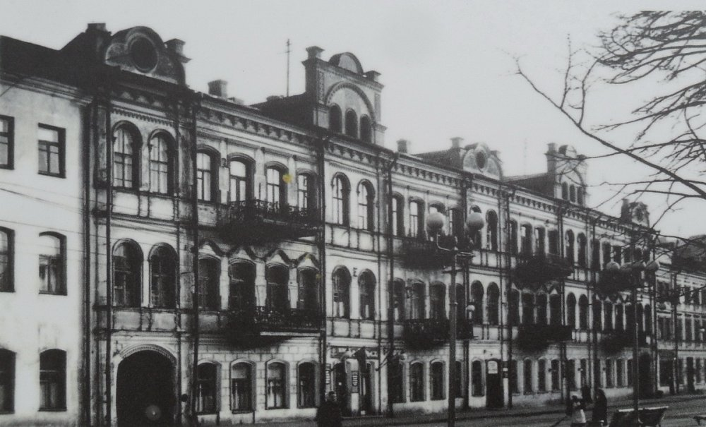 Беларуская (тарашкевіца): Менск (Miensk), вуліца Зборавая (vulica Zboravaja). Гасьцініца Гарні (Garni)